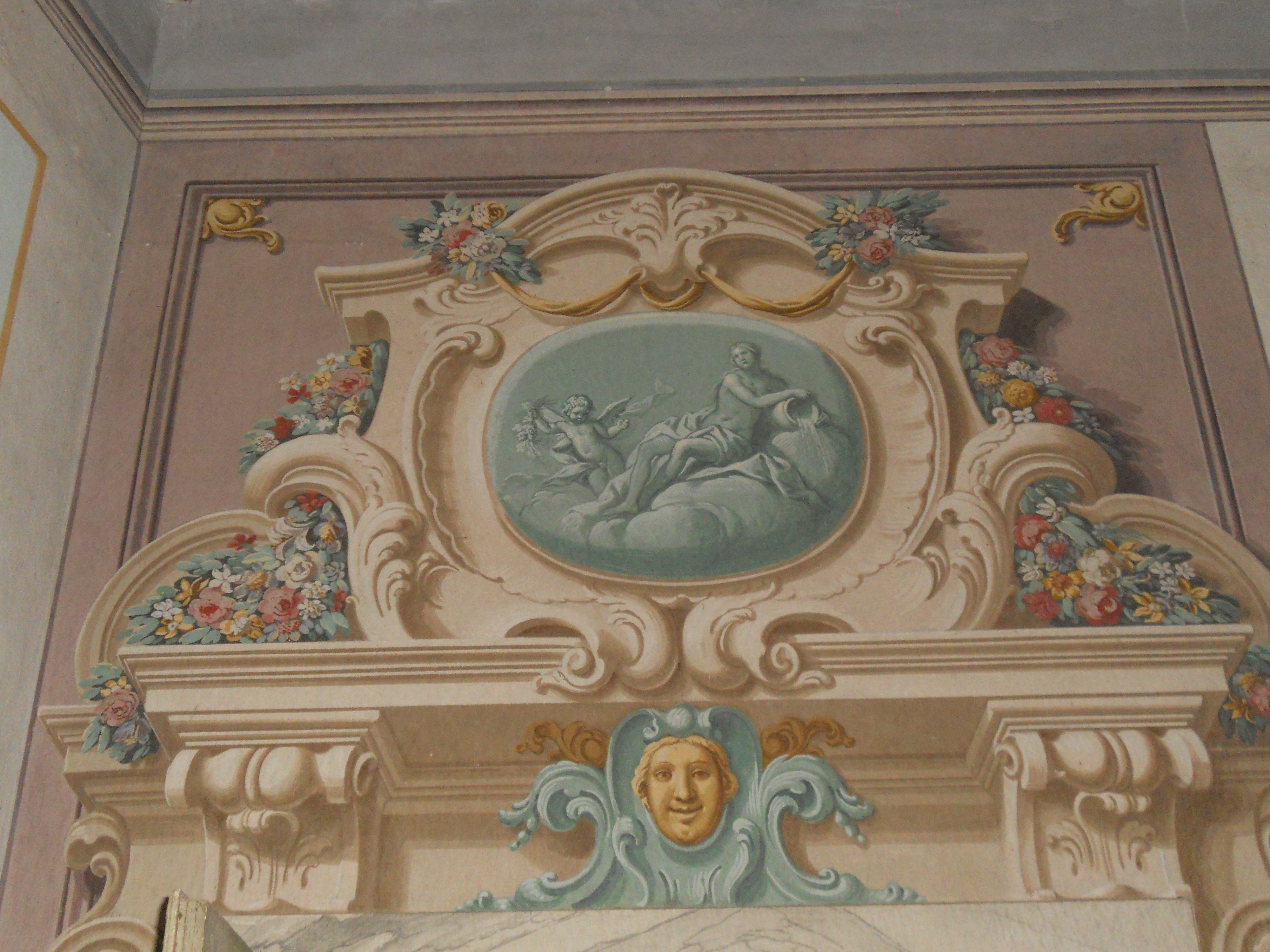 Villa medicea di Buti, interno, affresco allegoria.